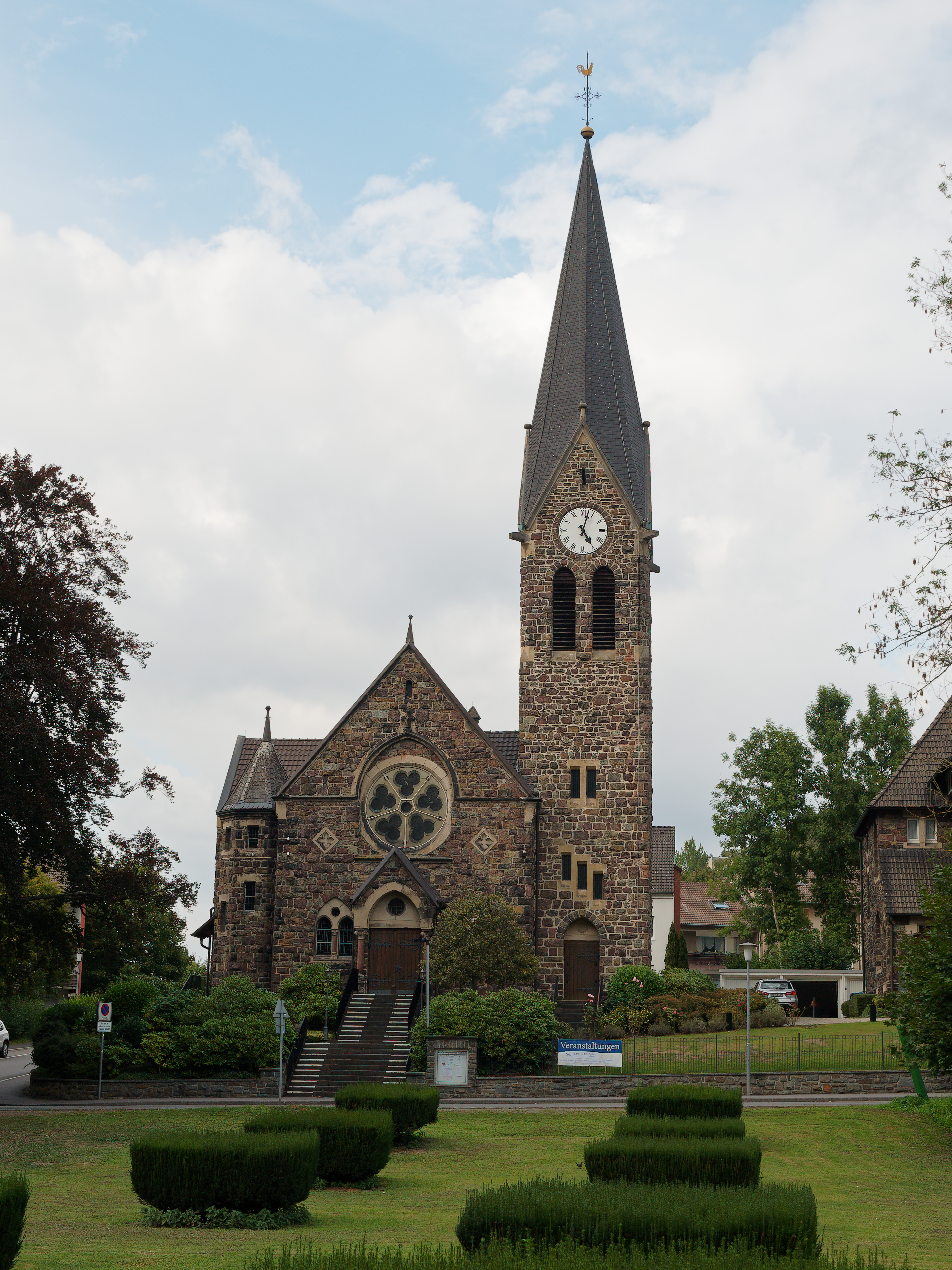 Die evangelische Kirche in Nachrodt, Kirchstr. 1.